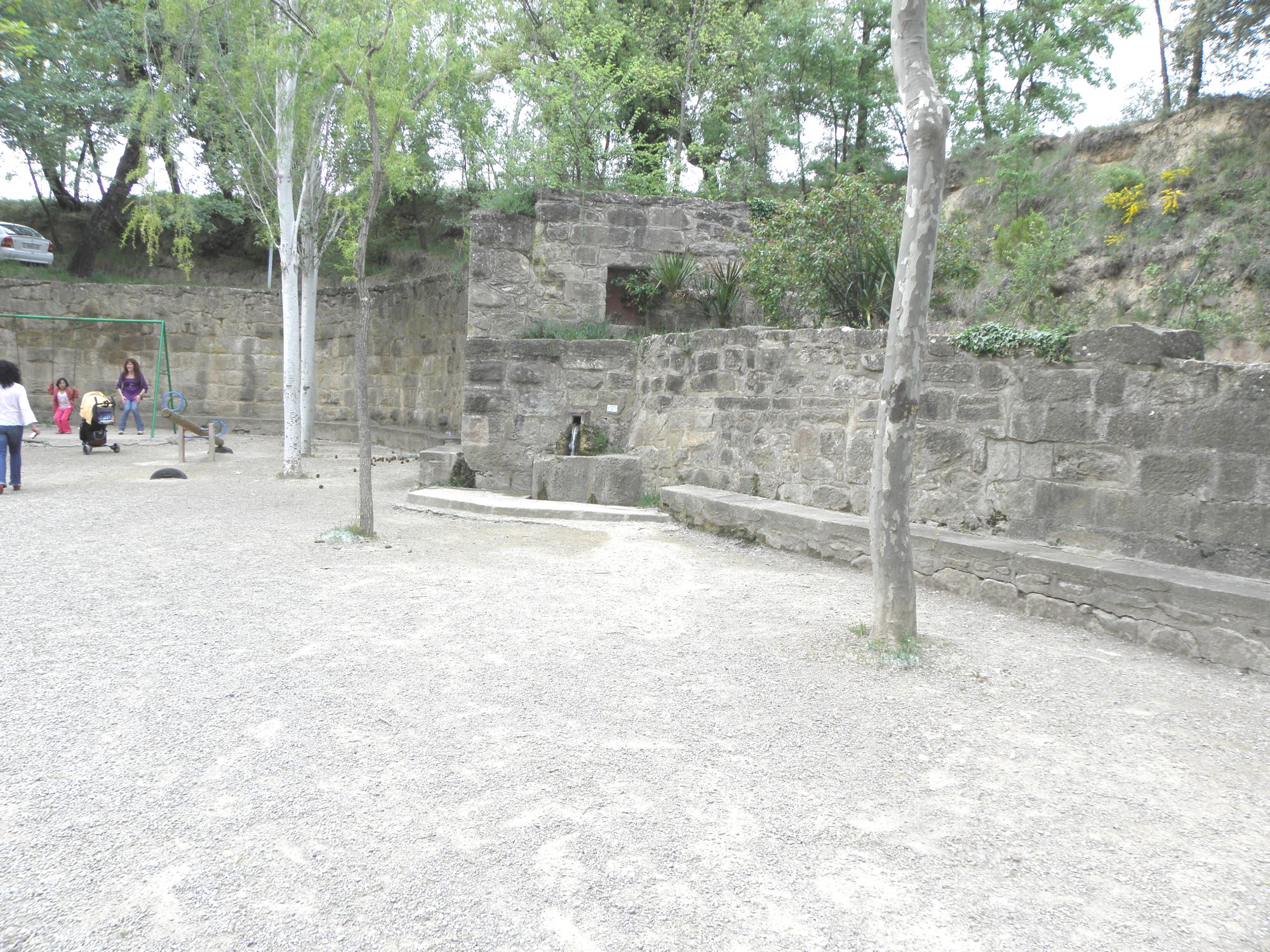 La Mare de la Font, al municipi de Solsona (Solsonès)